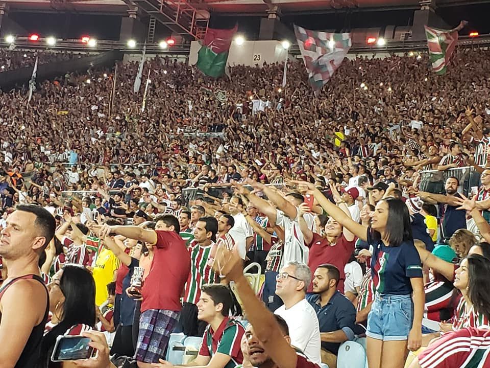 Torcida do Fluminense no empate do clube por 0 a 0 em 4 de dezembro de 2019, perante 39.965 torcedores durante a partida.